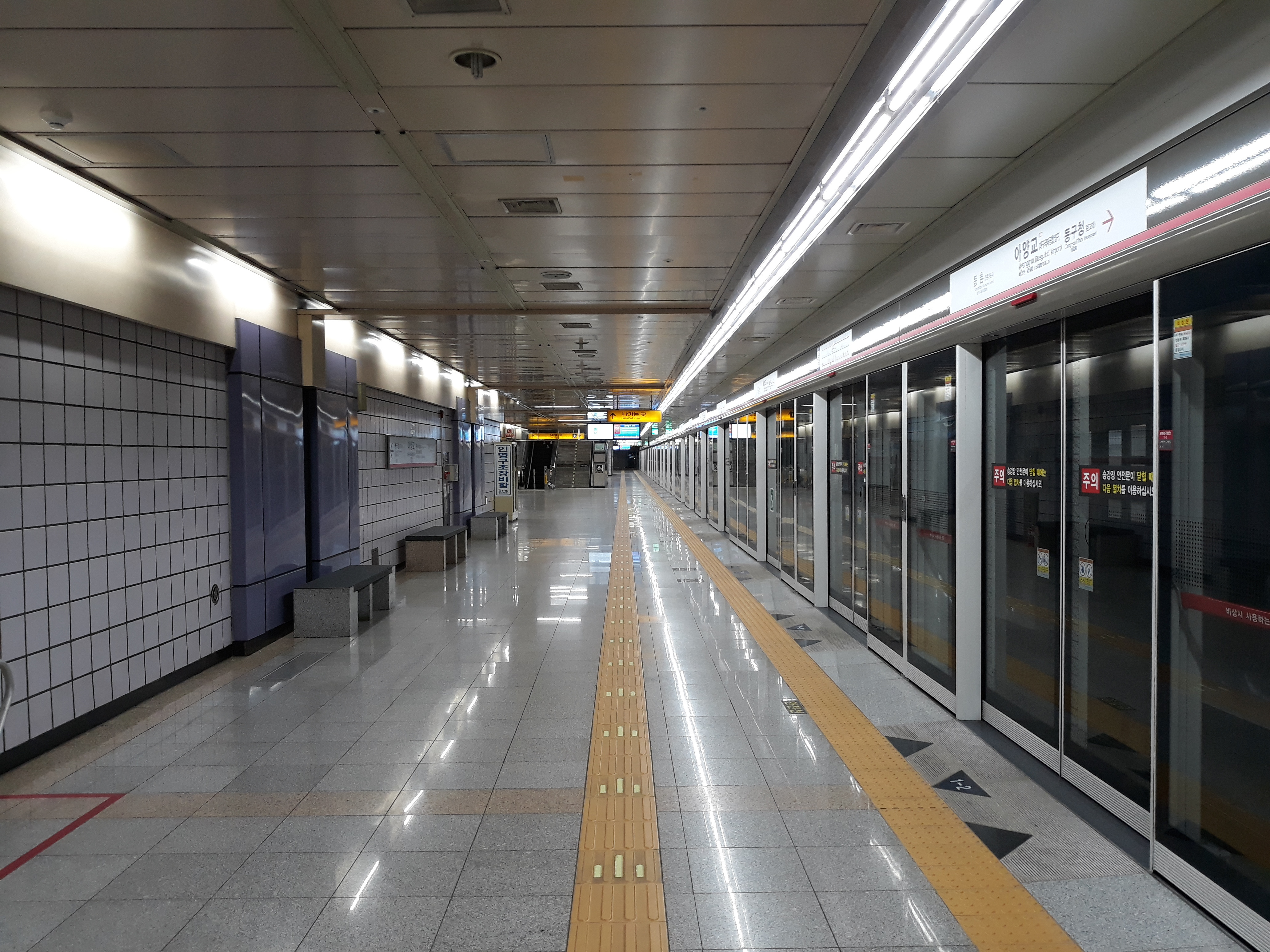 대구 도시철도 1호선 아양교역 설화명곡 방면 승강장